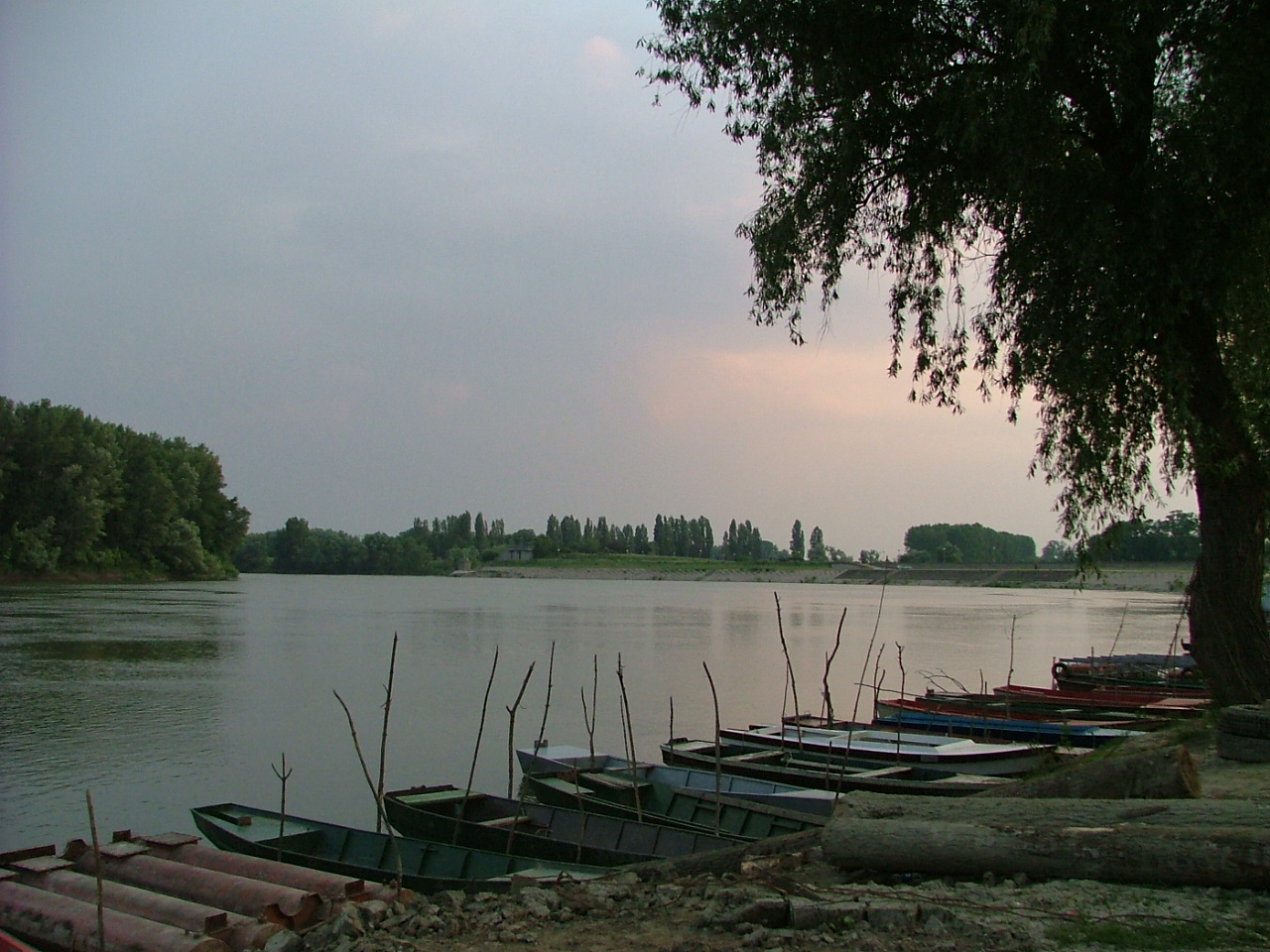 A Tiszapart Óbecsénél (Szerbia)